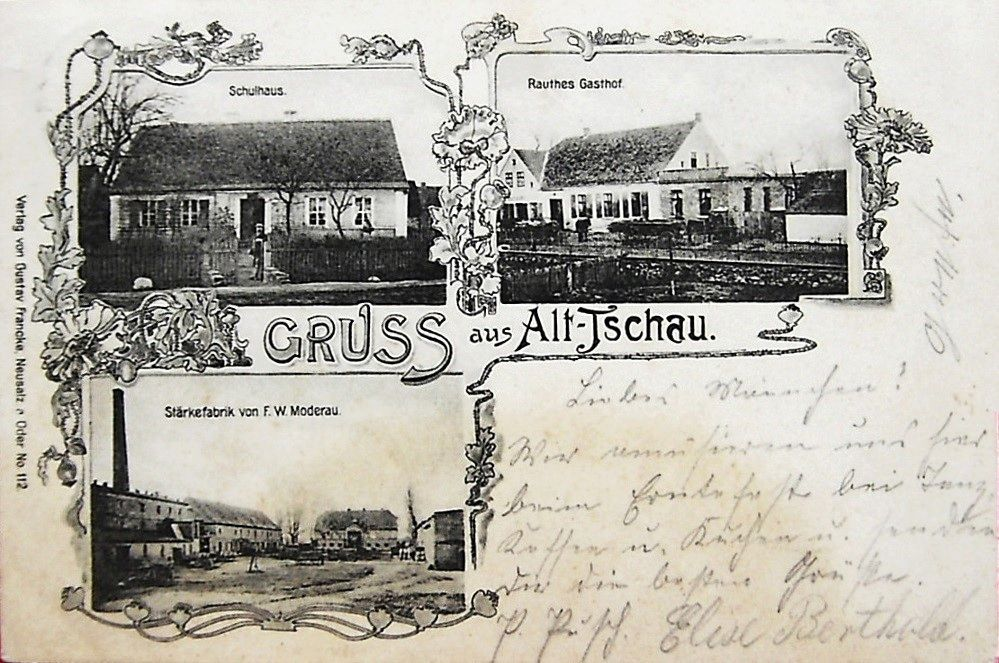 alte Postkarte von Alt Tschau ( heute Stare zabno), heute eingemeindet nach Nowa Sól